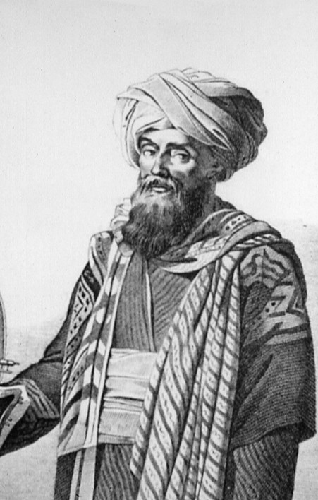 Gravat de Domenec Badia, conegut com Ali bei el Abassí (Domingo Badía y Leblich)